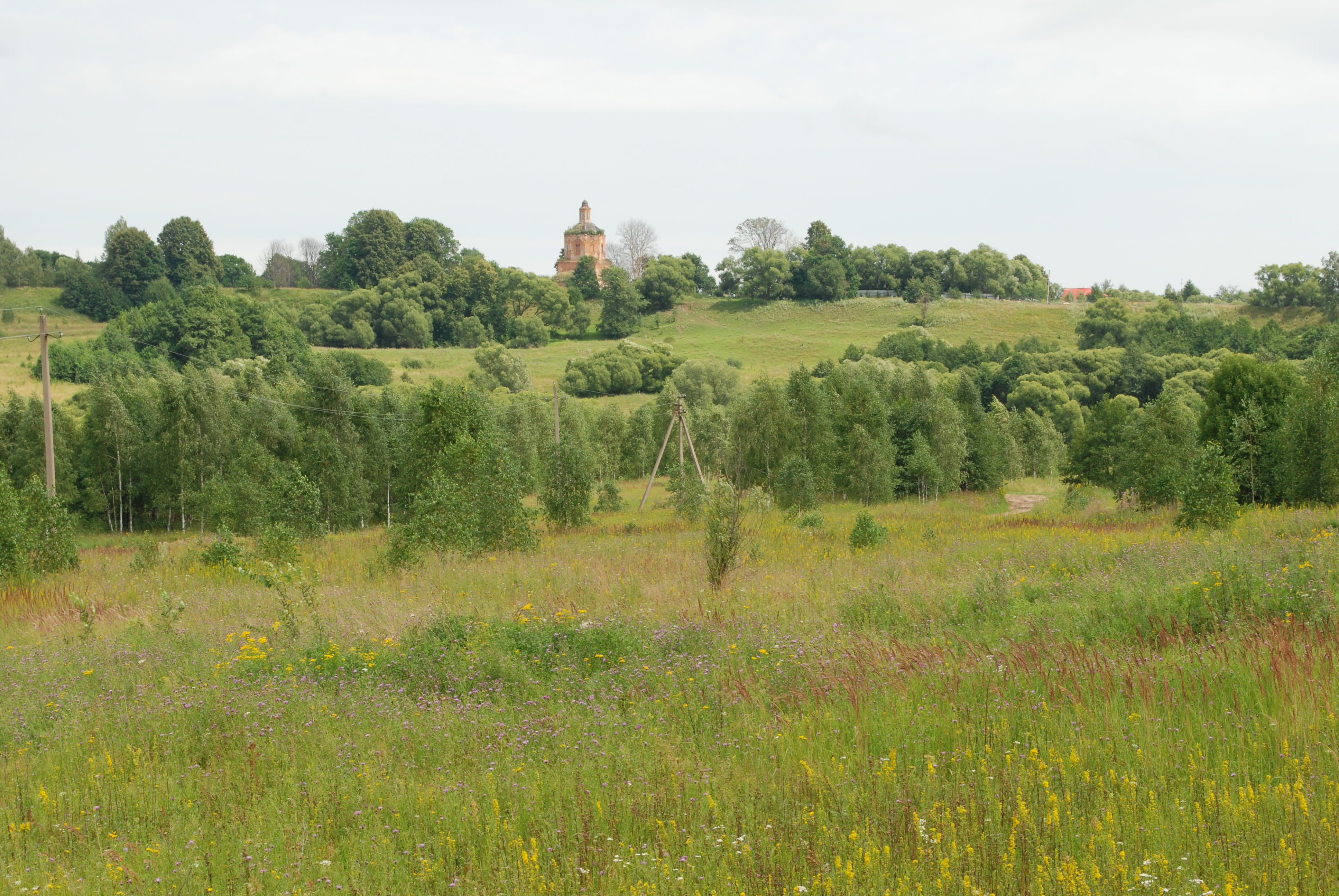 Богоявленская церковь (Калужская область, Мосальск, село Ленск)